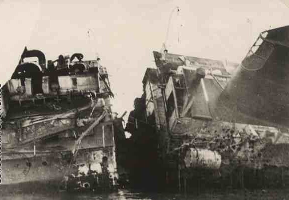 Naufrage Champo2